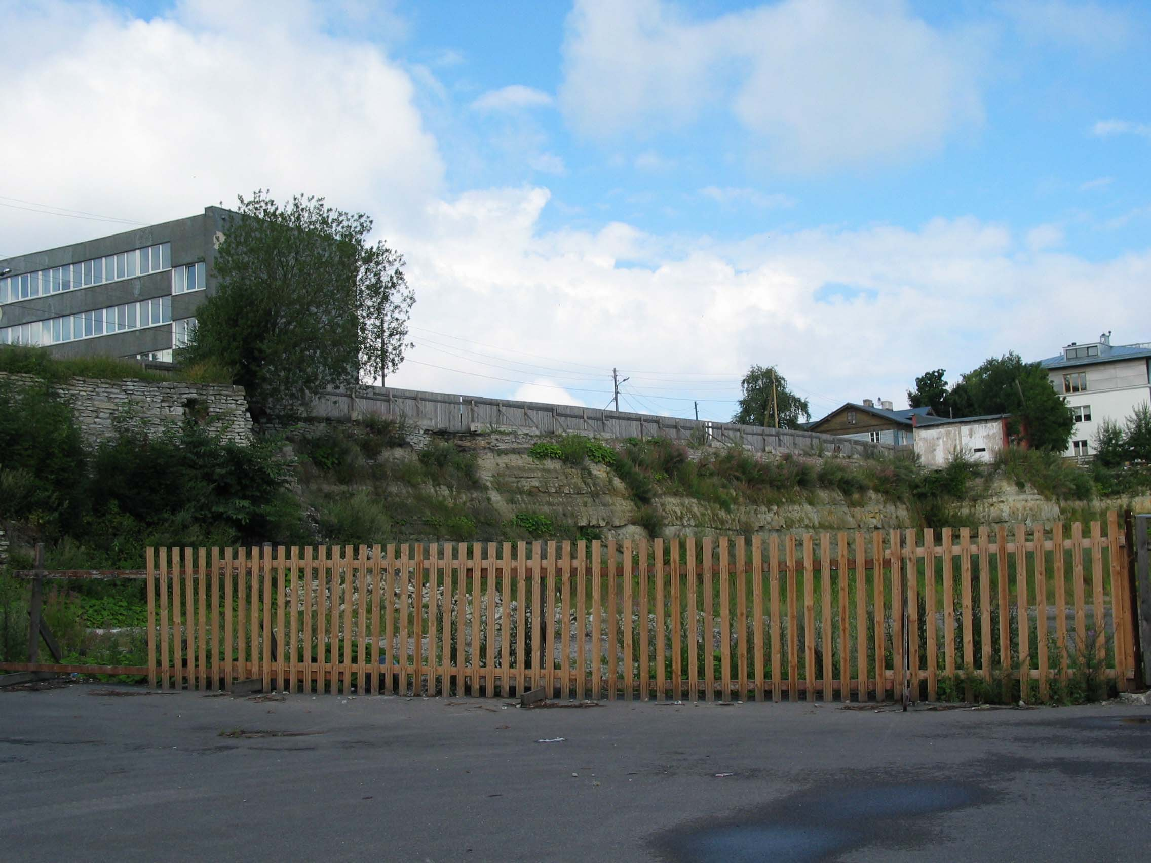 Vaade Suur-Patarei tänava klindiastangule Kalasadama poolt.